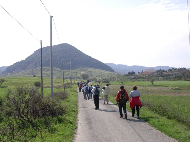 Autorizzazione OTRS # 2008022710009155 Monte Sant'Elia